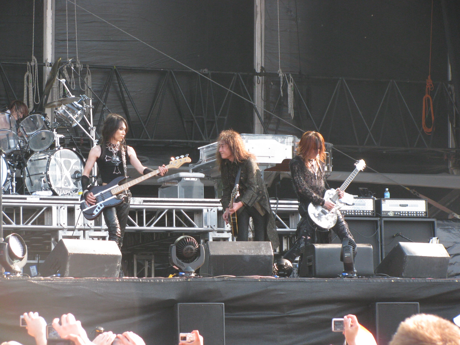 X Japan